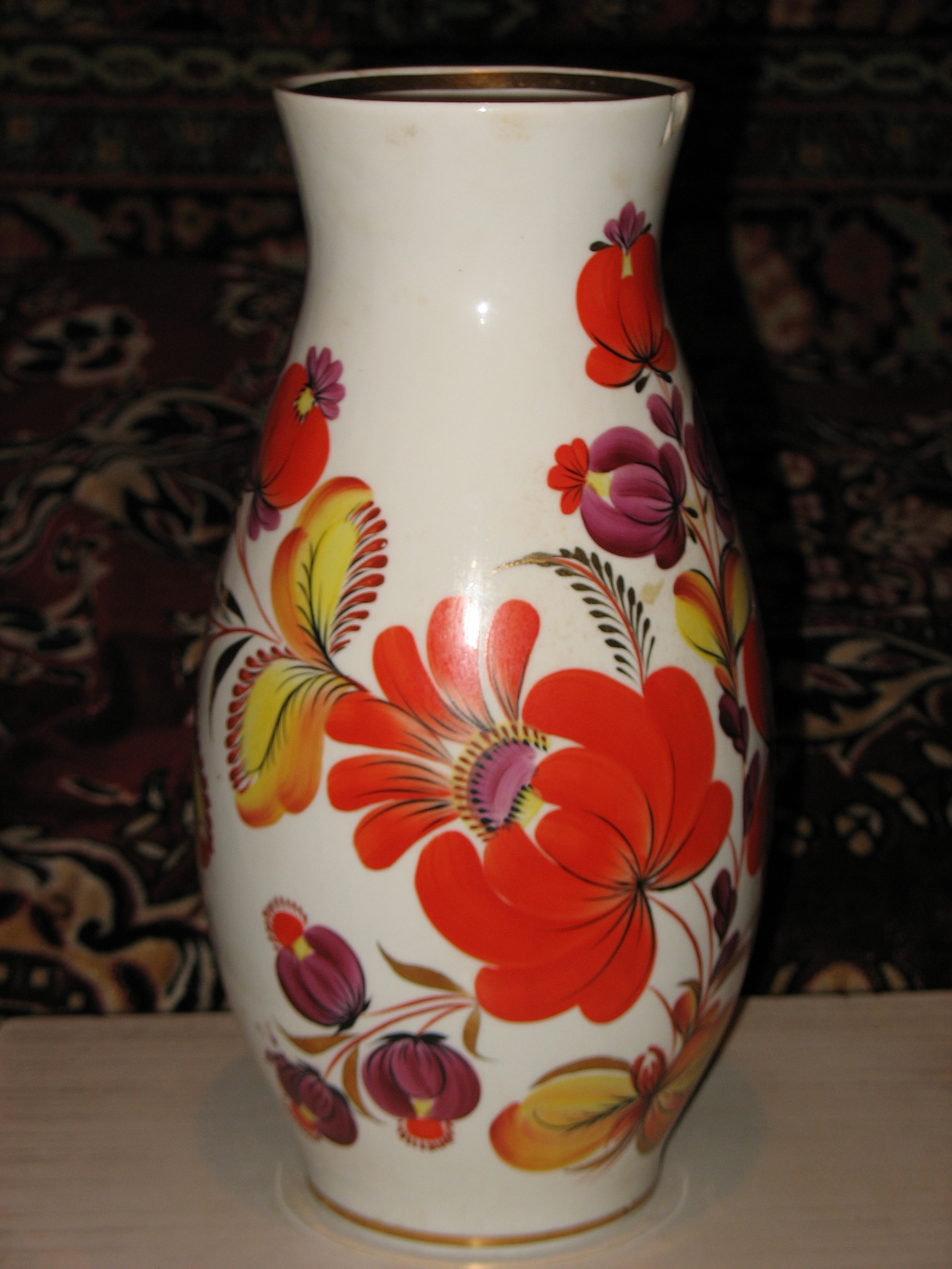 Ваза фарфорова, надглазурний розпис. Виготовлено в УРСР у 2 половині ХХ століття на Київському експериментальному кераміко-художньому заводі. Автор розпису Тимченко М. К.